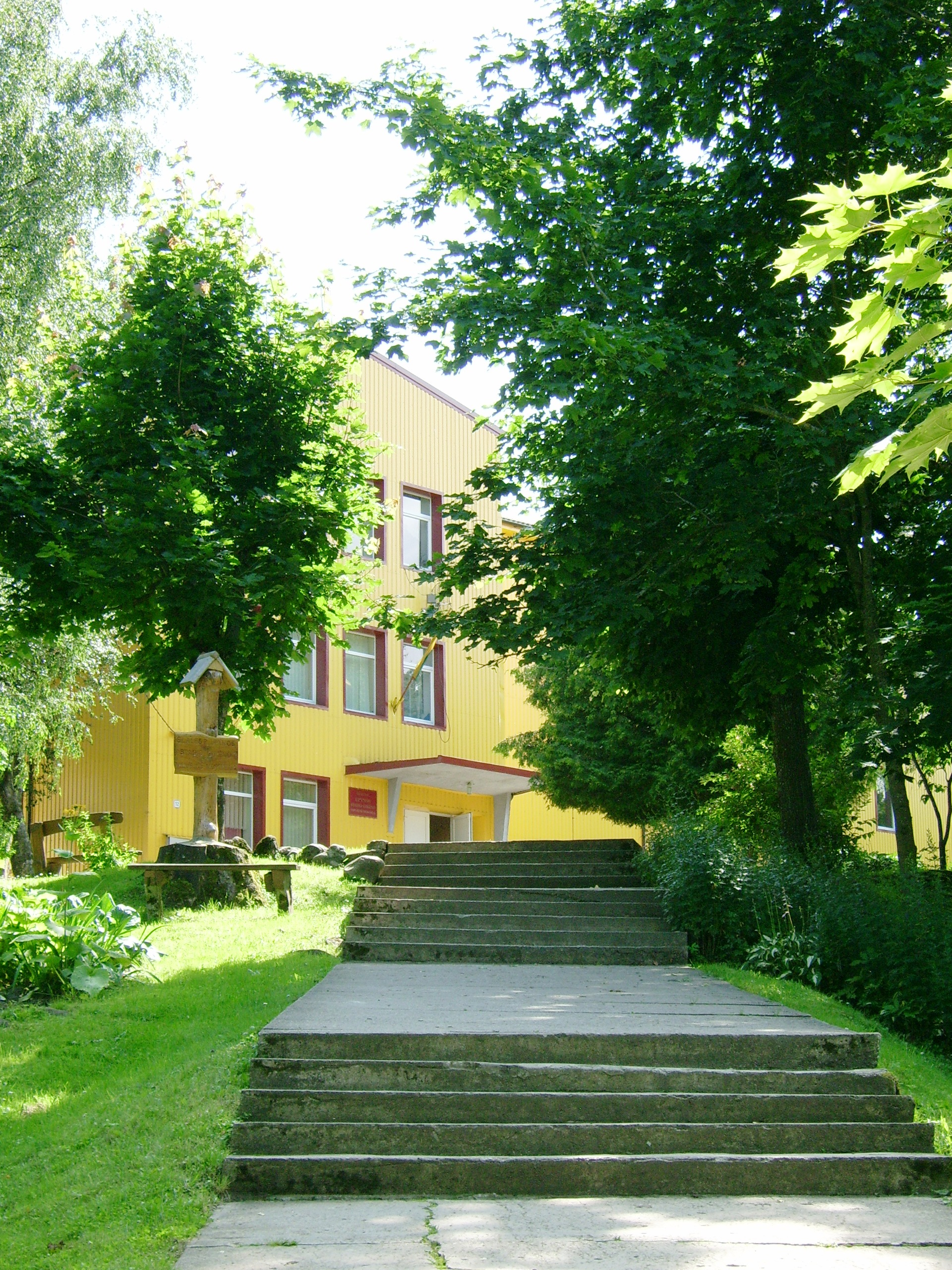 Upynos mokykla